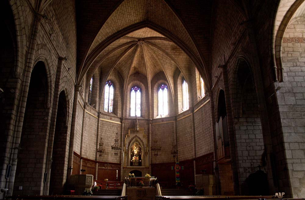 Capçalera de l'església de Sant Miquel Arcàngel de Cardona (Bages)